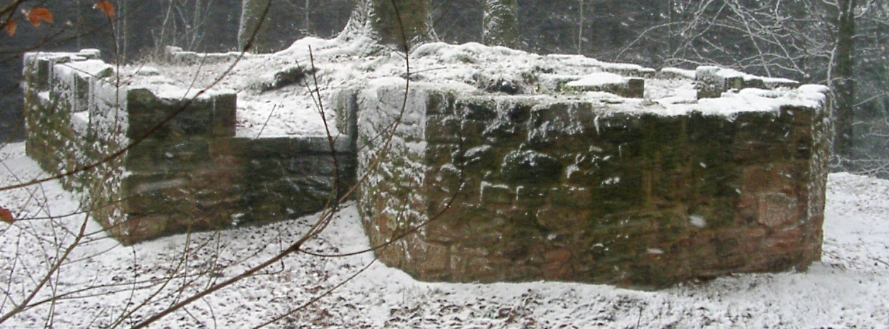 Schloss Murrmirnichtviel: Ruine des Jagdhaus mit Wachturm Murrmirnichtviel bei Bad Dürkheim.